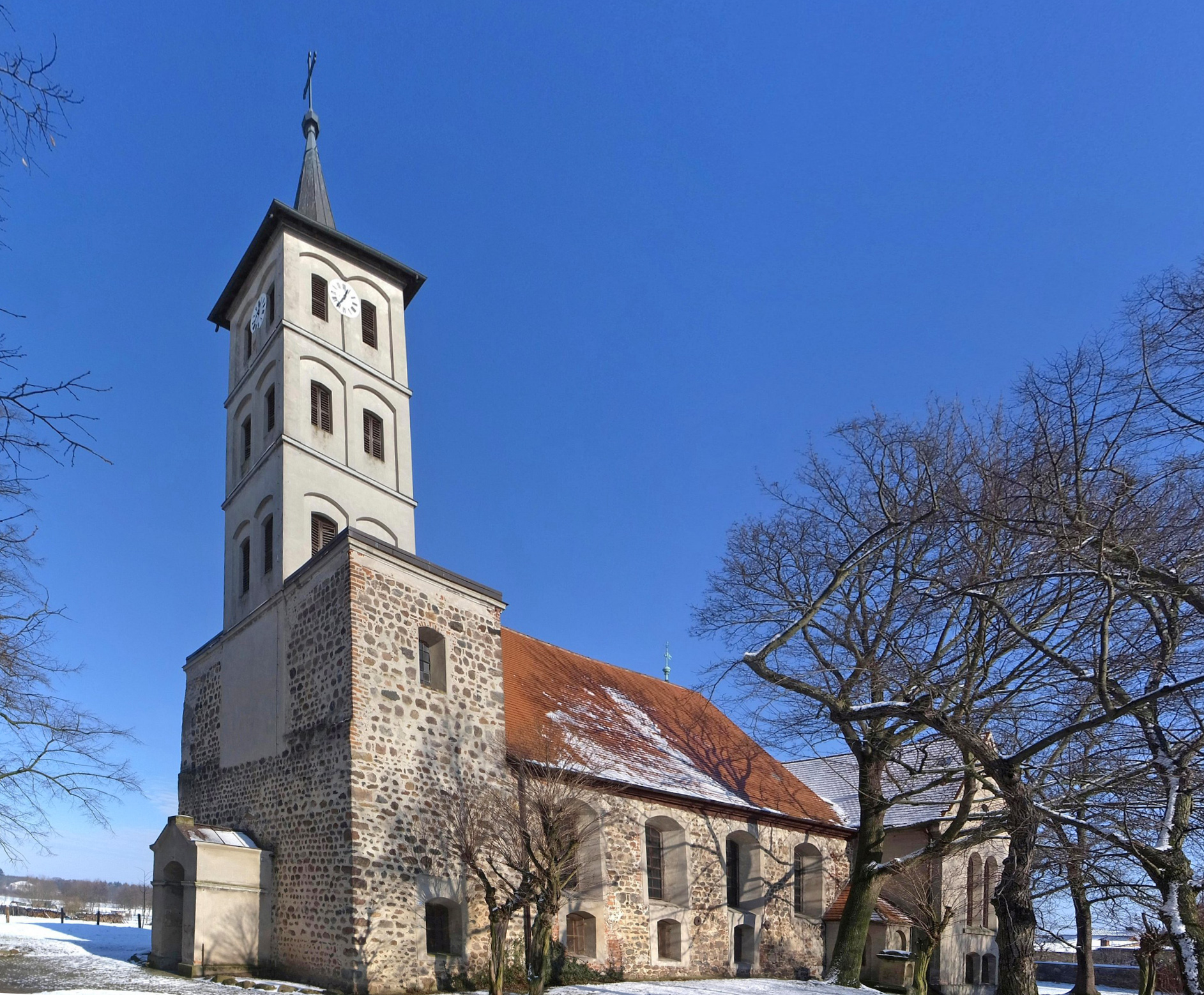 Stadt Zerbst/Anhalt, Kirche im Ortsteil Lindau